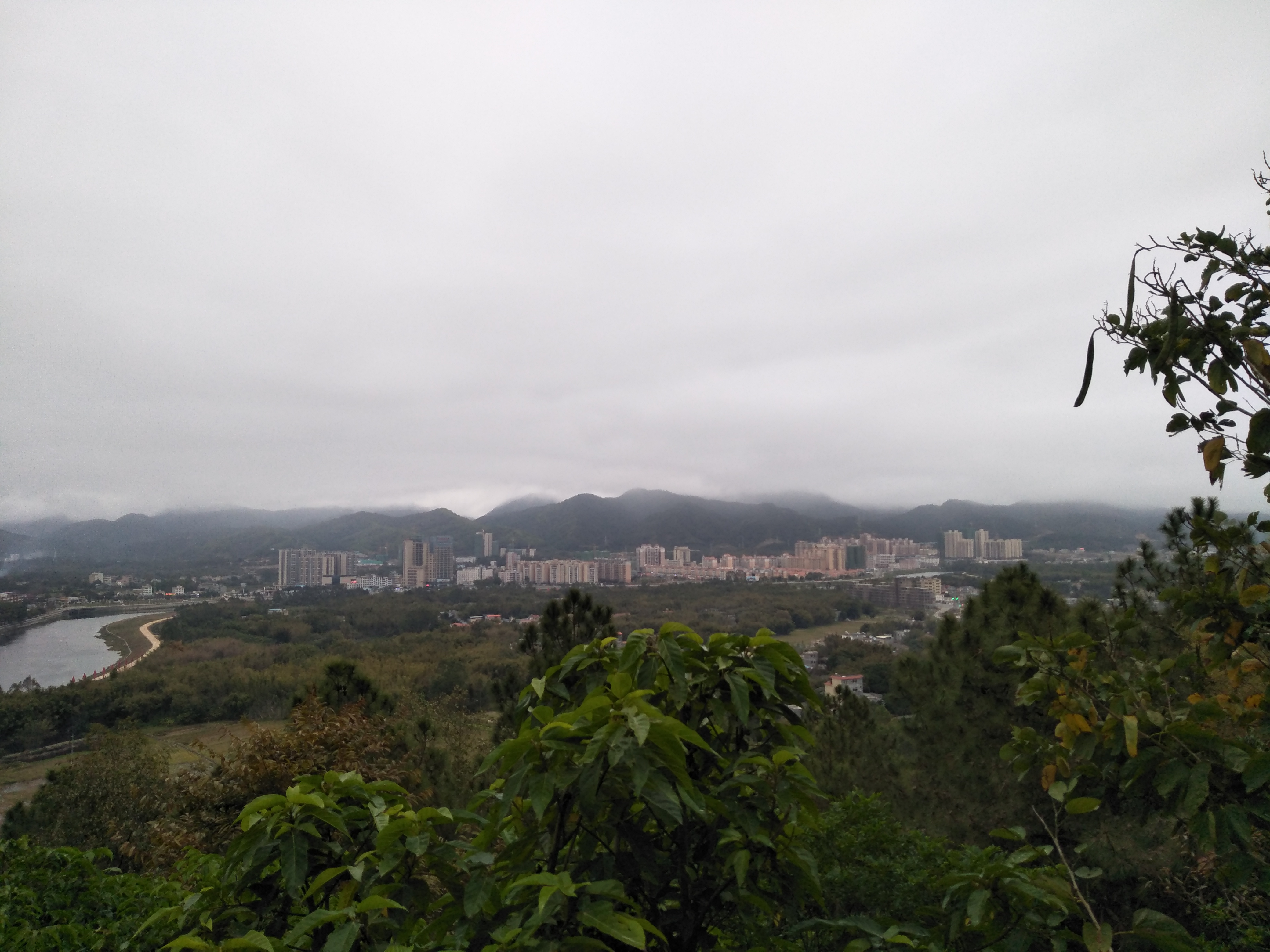 龍門縣城西林公園，俯瞰龍門縣城